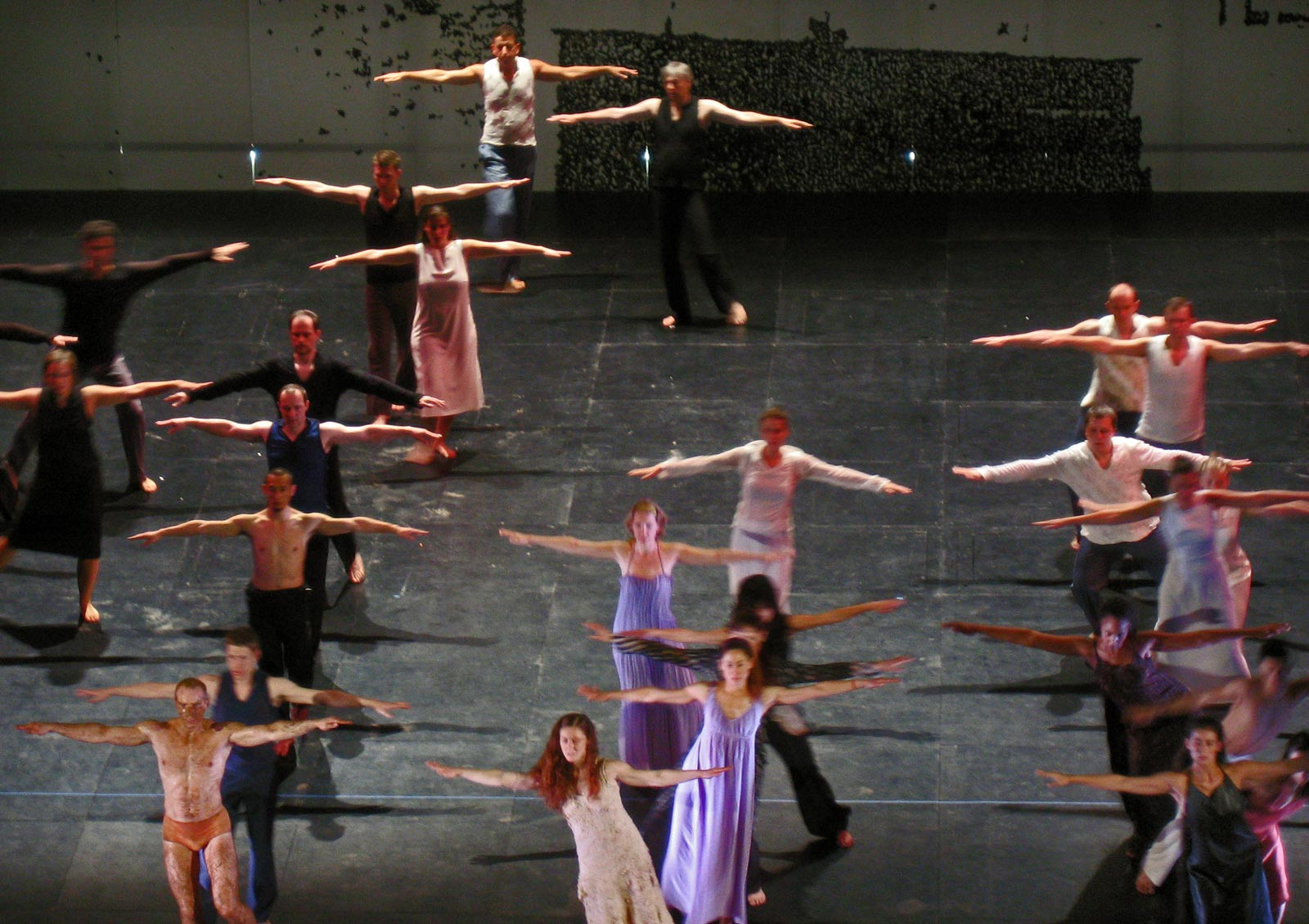 Staatsoper